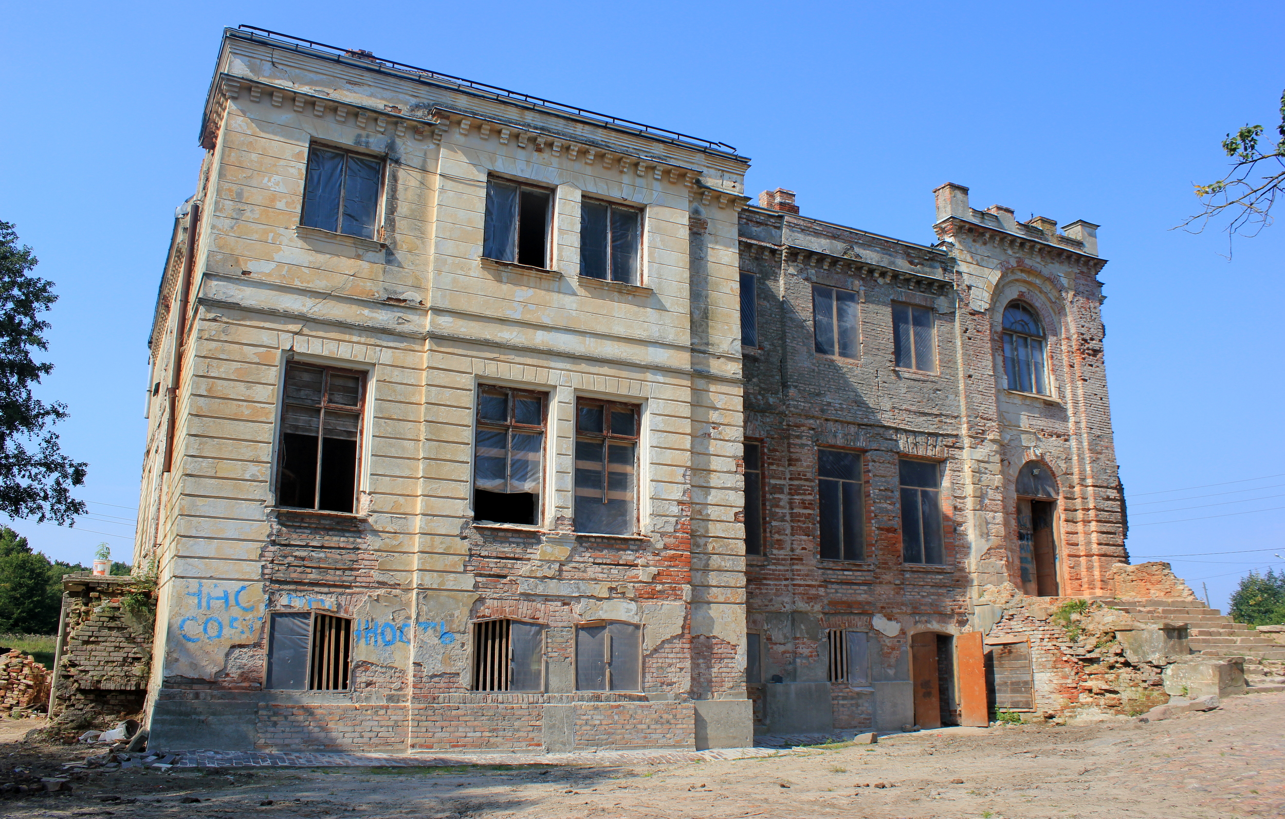 Schloss Grünhoff in Roschtschino, Oblast Kaliningrad, Russland.